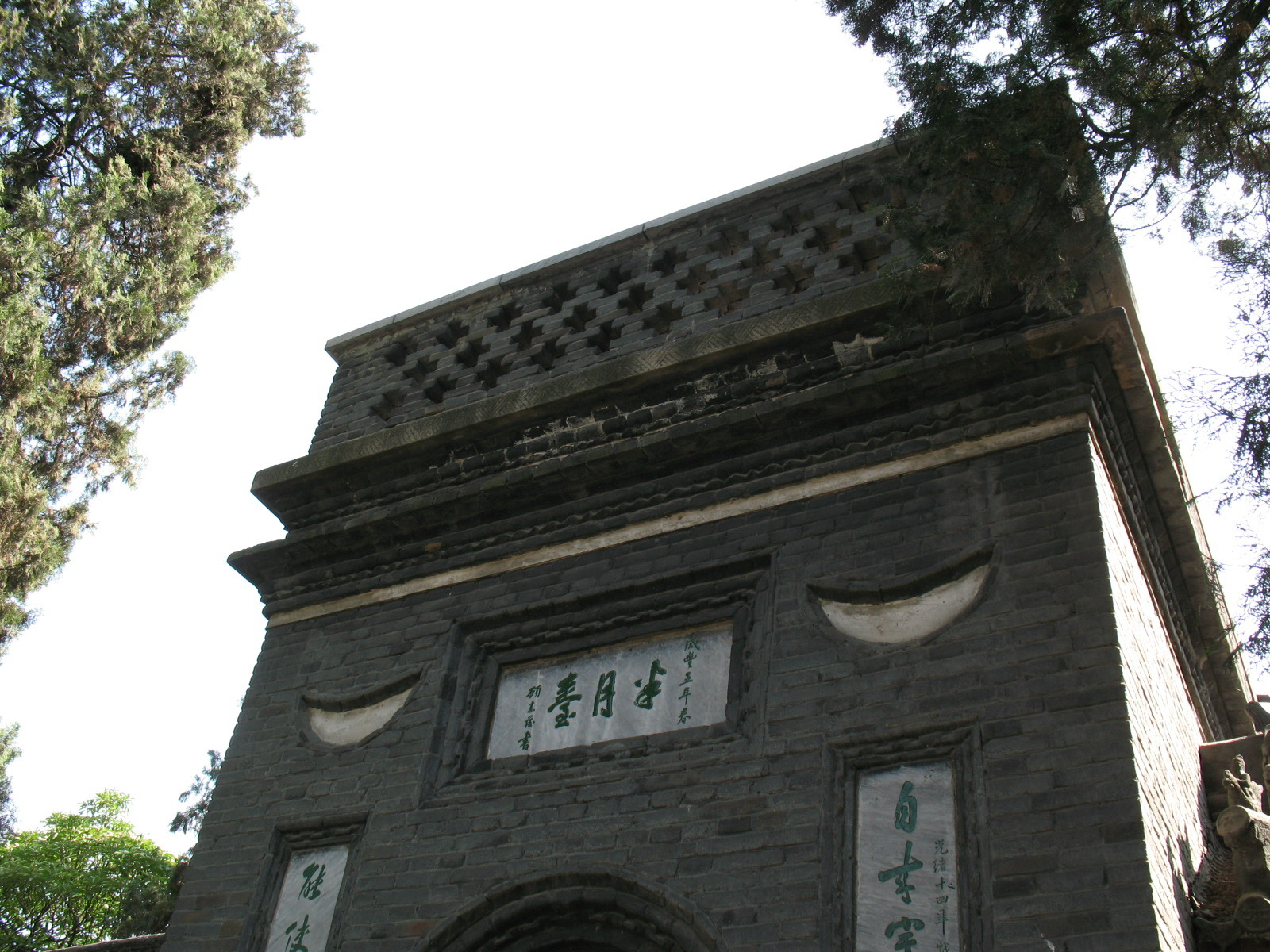 Nanyang Memorial Temple to Wuhou 河南南阳武侯祠